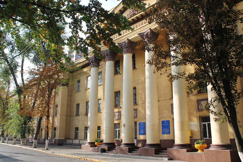 Аграрний університет у Дніпрі.